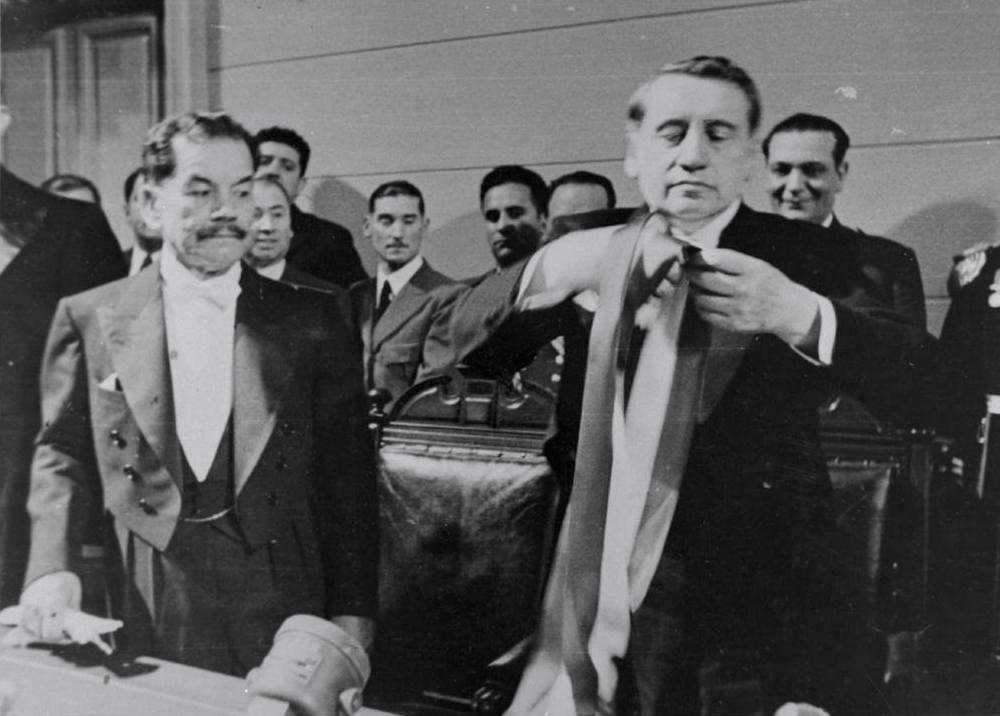 Arturo Alessandri entrega en 1938 en el Congreso Nacional la Banda Presidencial a Pedro Aguirre Cerda, candidato del Frente Popular que resultó electo para sucederlo en la primera magistratura.